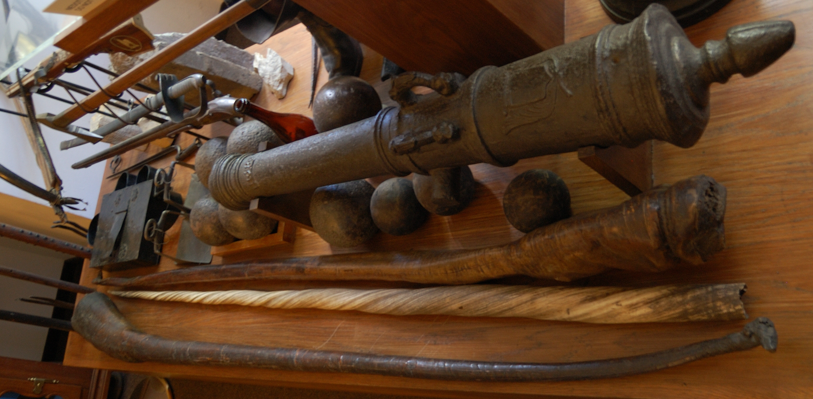 Dent de narval et autres curieux objets à la bibliothèque et au cabinet de curiosités du monastère de Strahov, 2015